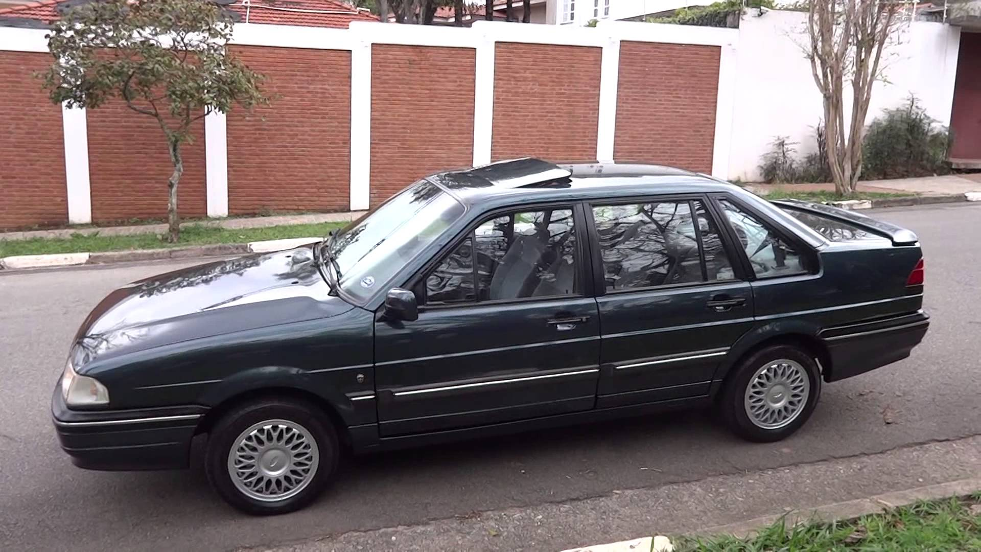 Ford Versailles/Galaxy 2.0i 1996